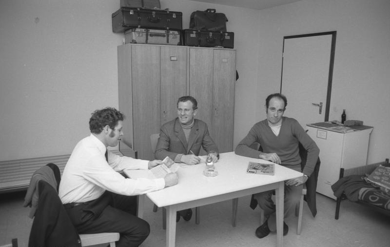 VW-Werk, Wolfsburg Gastarbeiter